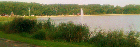 Nieuwdonk